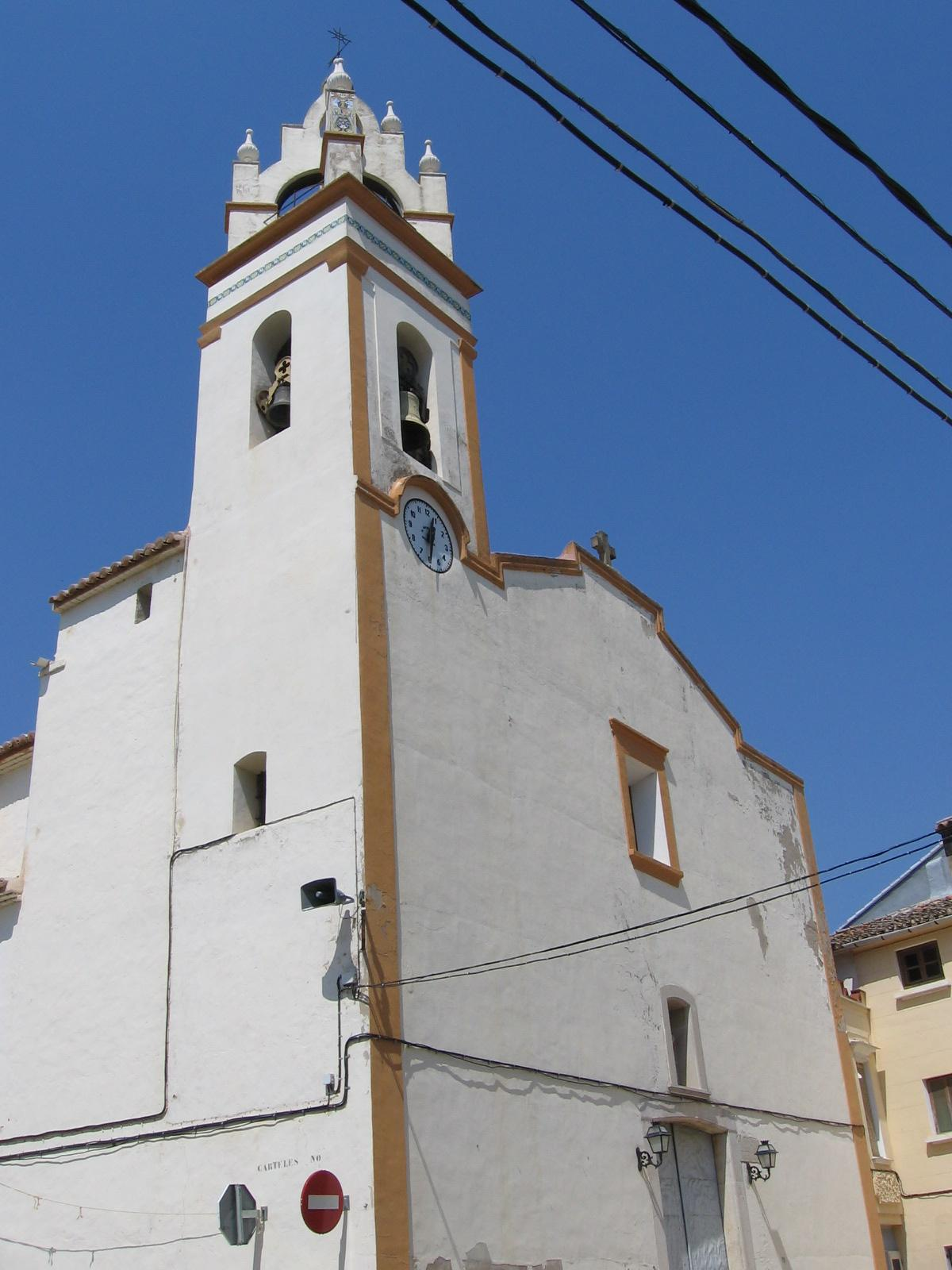 Benifairó de la Valldigna (Valencia). Iglesia